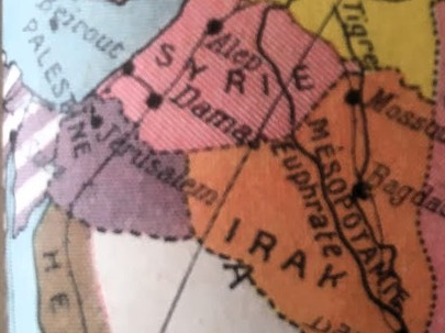 Tirée du Nouvel Atlas classique de Maurice Fallex, cette carte montre l'étendue de la Palestine mandataire